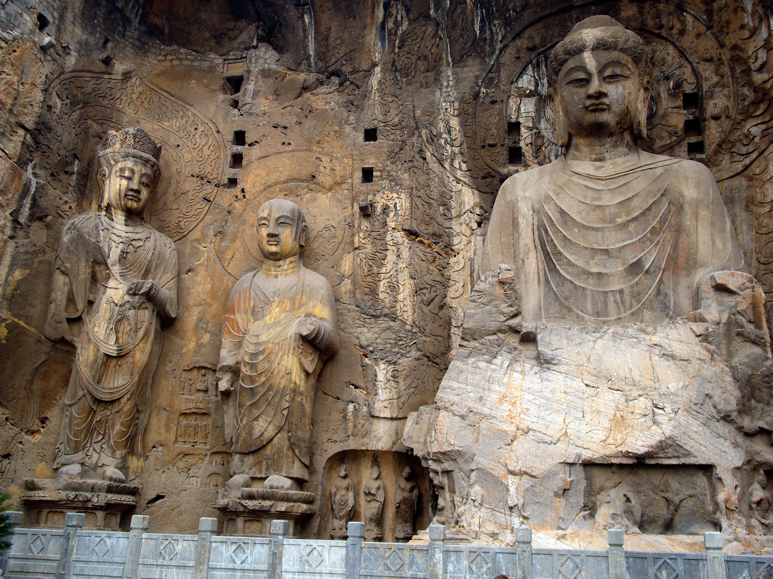 龍門盧舍那大佛和菩蕯羅漢像